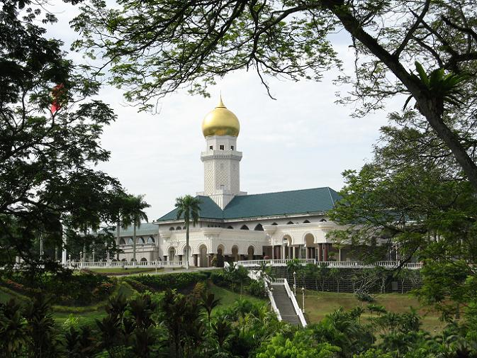 Istana Alam Shah